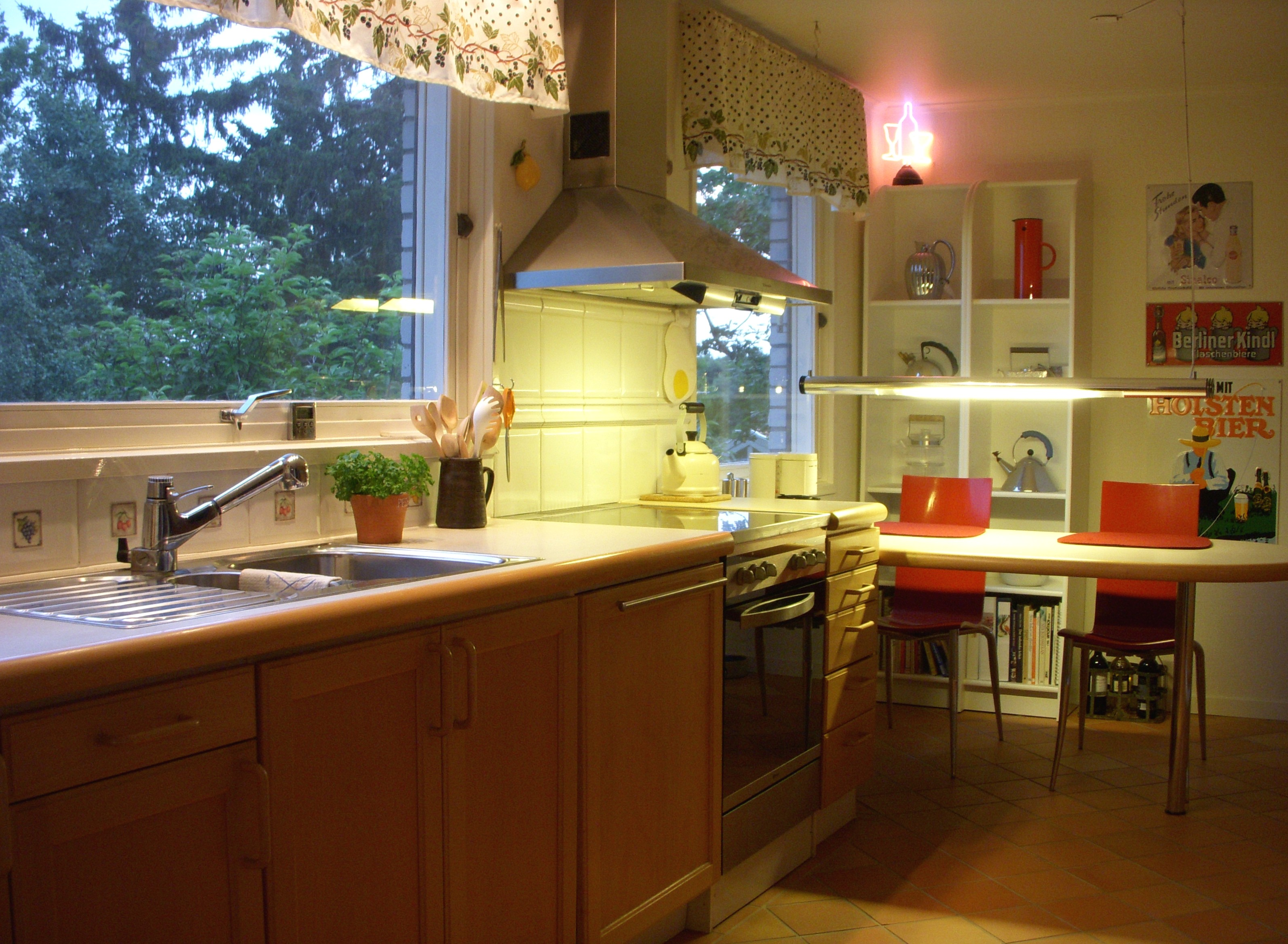 Svensk standardkök från 1968, upprustat till 2000-års standard